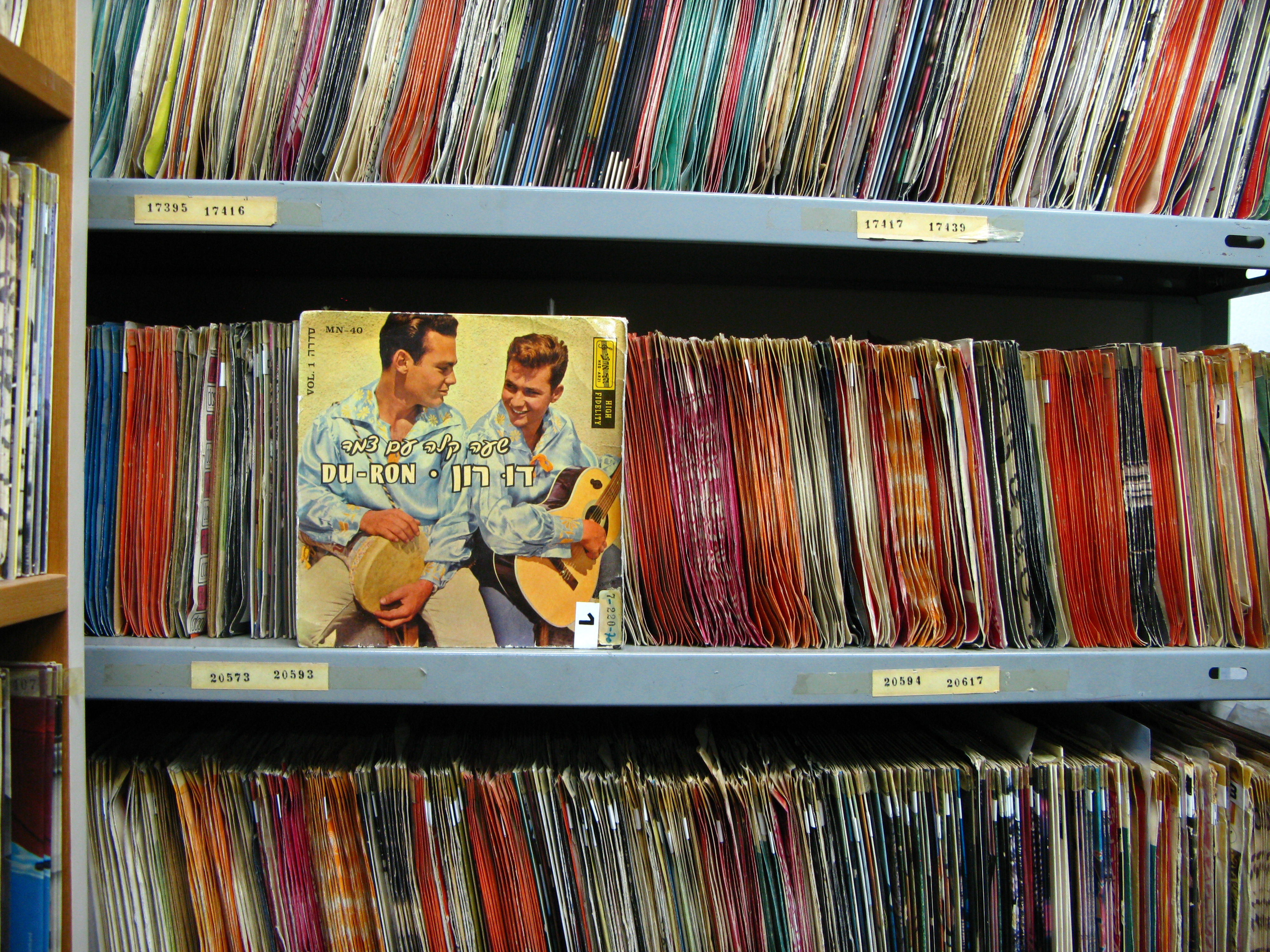 בניין קול ישראל ברחוב הלני המלכה בירושלים, משמש את תחנת הרדיו "קול ישראל" מאז ימי הרדיו המנדטורי ב-1939, ולסגירת רשות השידור.